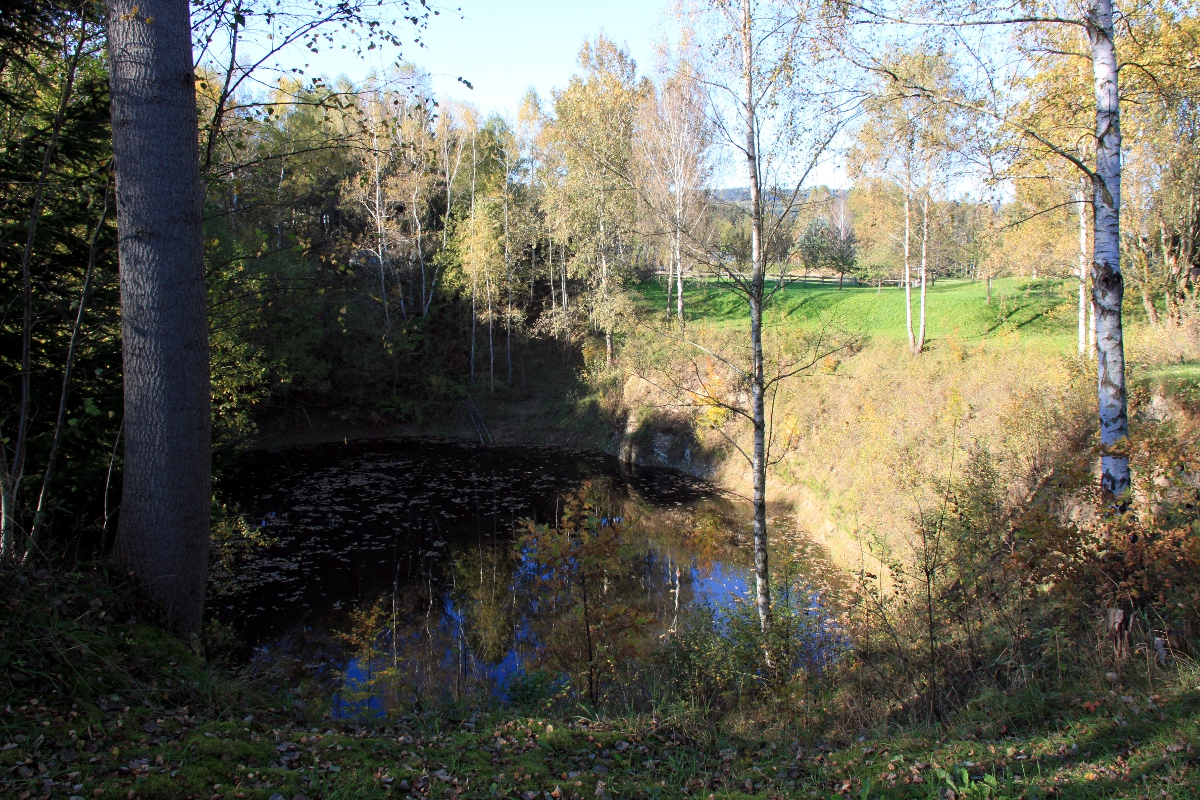 Kalkloch Langenberg